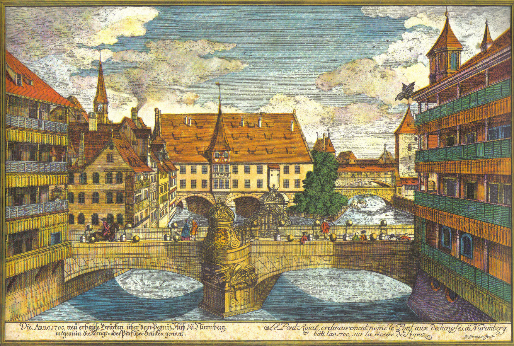 Bridge over Pegnitz in Nuremberg ("Barfüßer-", later "Museumsbrücke"), colored copper engraving Original Name: Die Anno 1700. neu erbaute Brücken über dem Pegnitz-Fluß zu Nürnberg